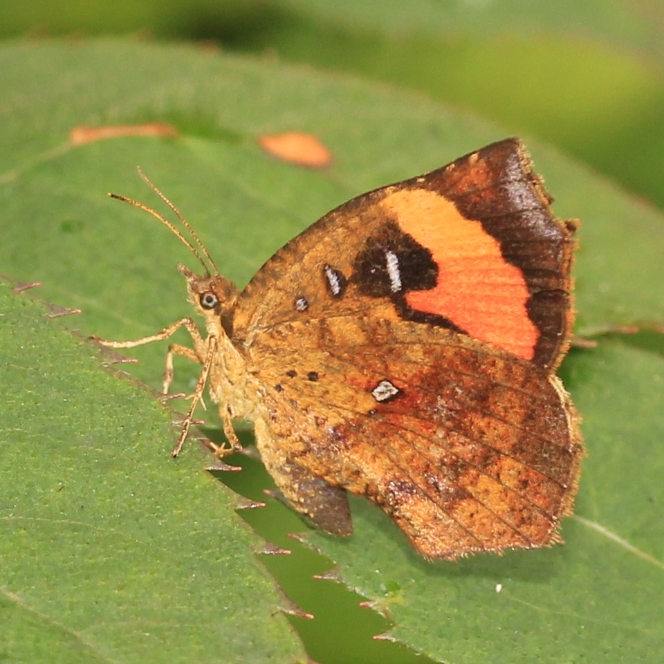 イカリモンガ（碇紋蛾、学名：Pterodecta feldern (Bremer, 1864) ）、金草岳（岐阜県揖斐川町）にて